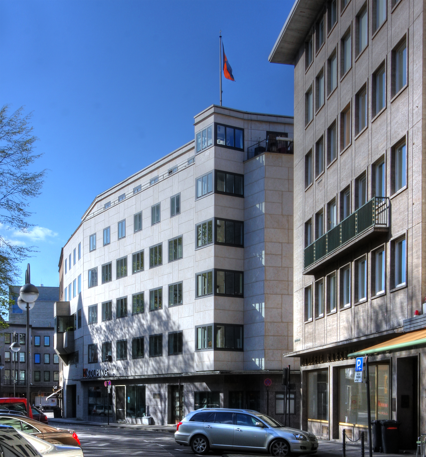 Kolpinhaus Köln, erbaut von Dominikus Böhm, 1929/1930